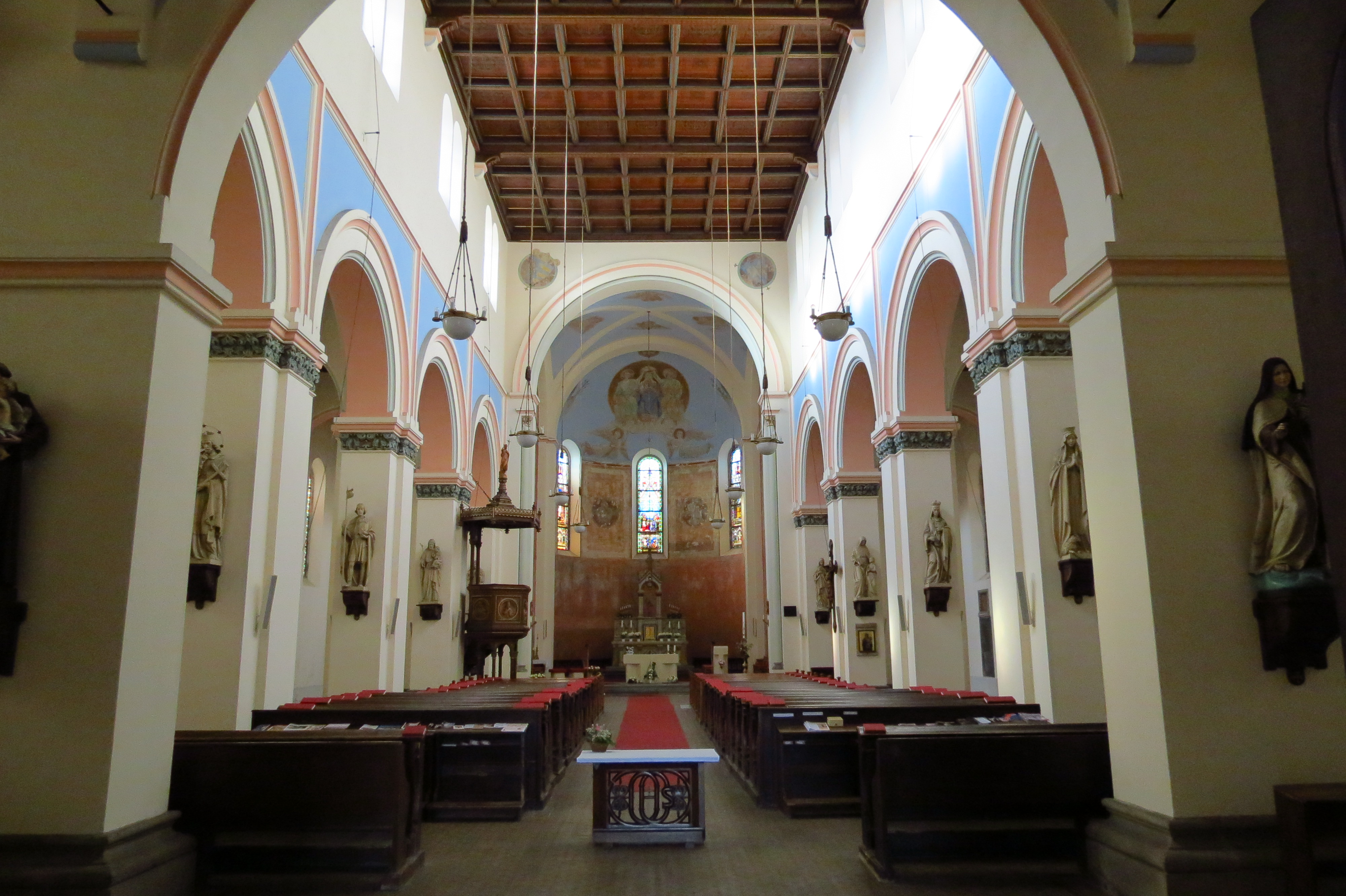 Kladno, interiér novorománsko-novorenesančního chrámu (baziliky) Nanebevzetí P. Marie ze sklonku 19. století.